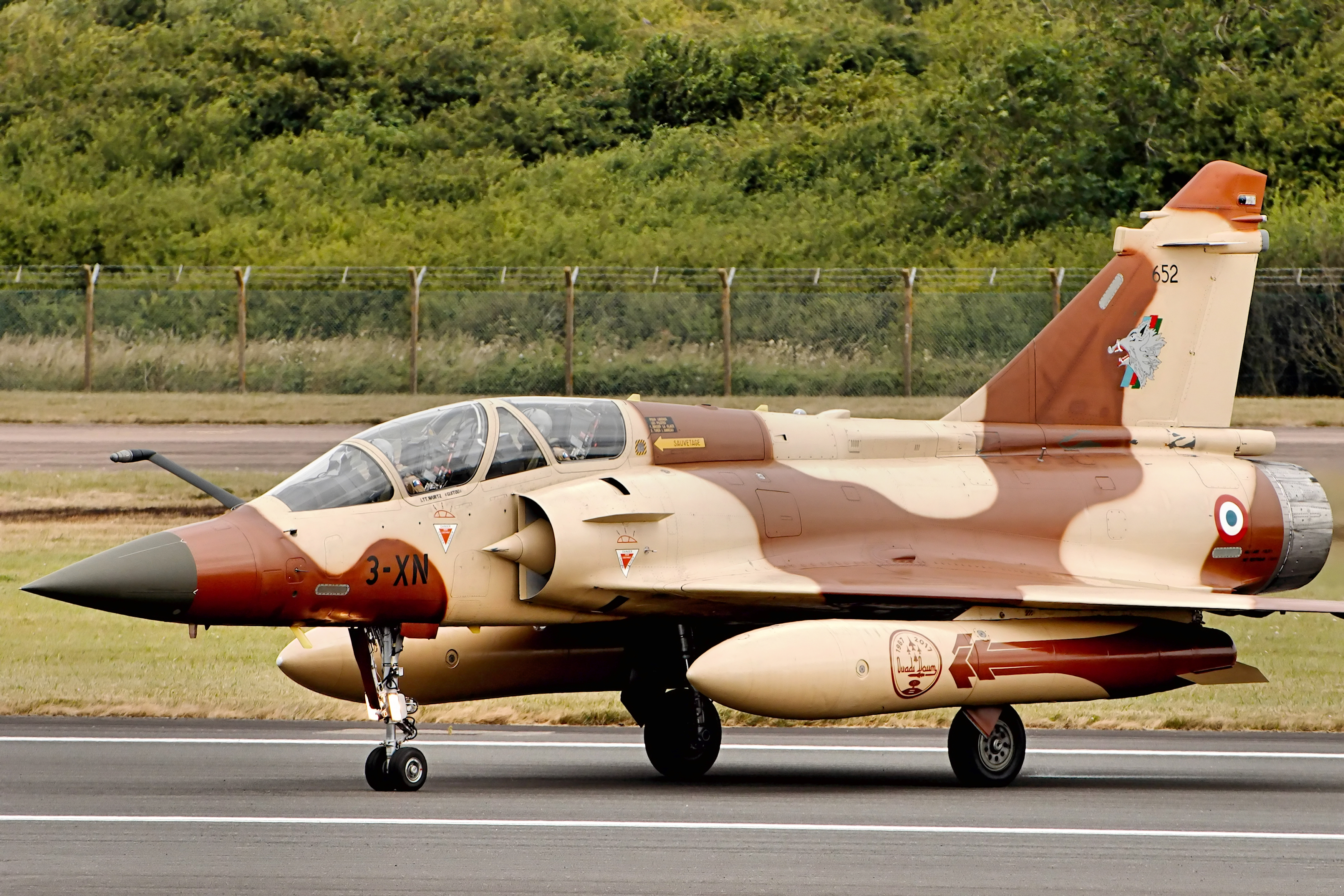 Mirage 2000D - RIAT 2017